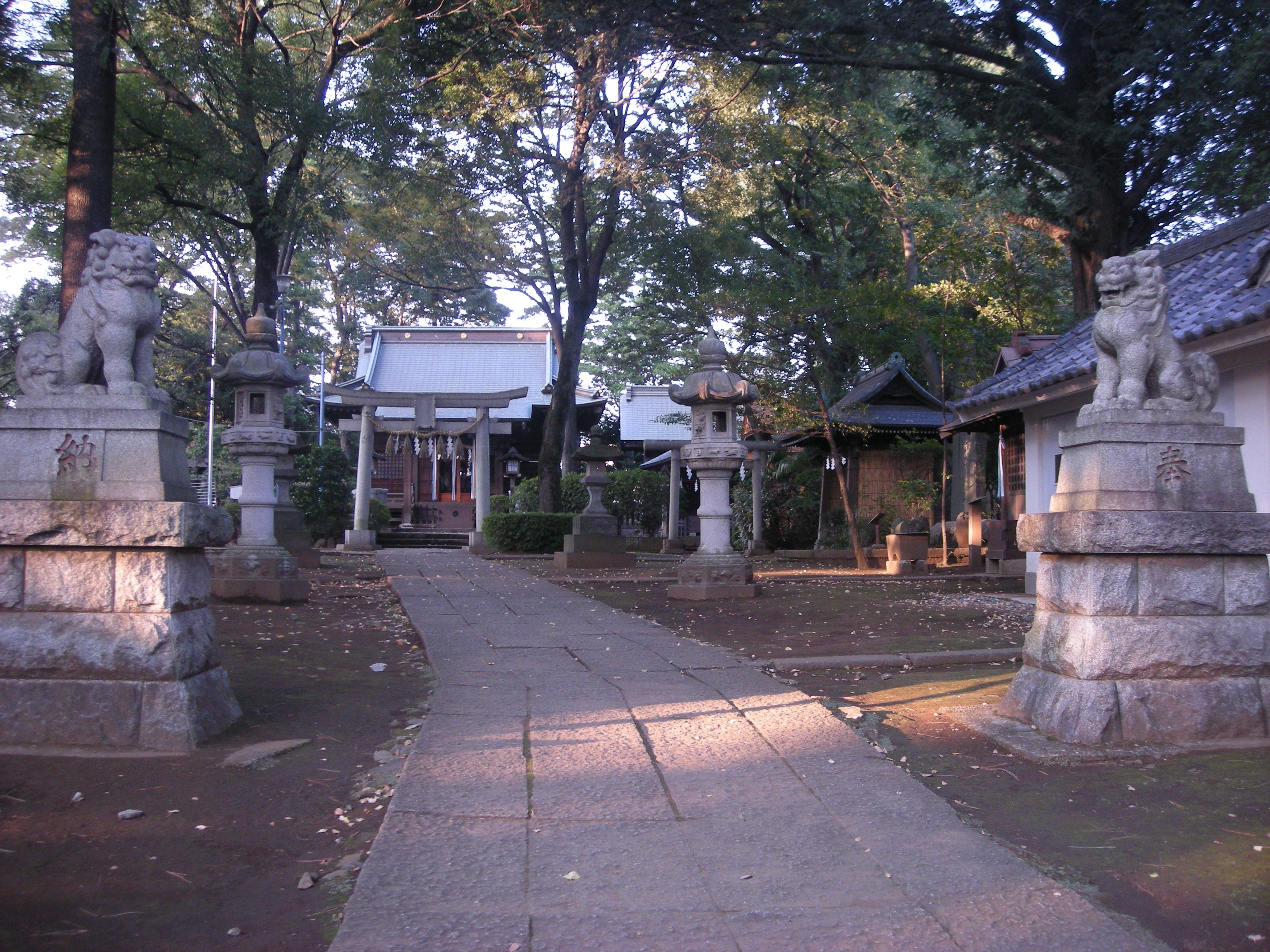 氷川神社（豊玉） Toyotama Hikawa shrine